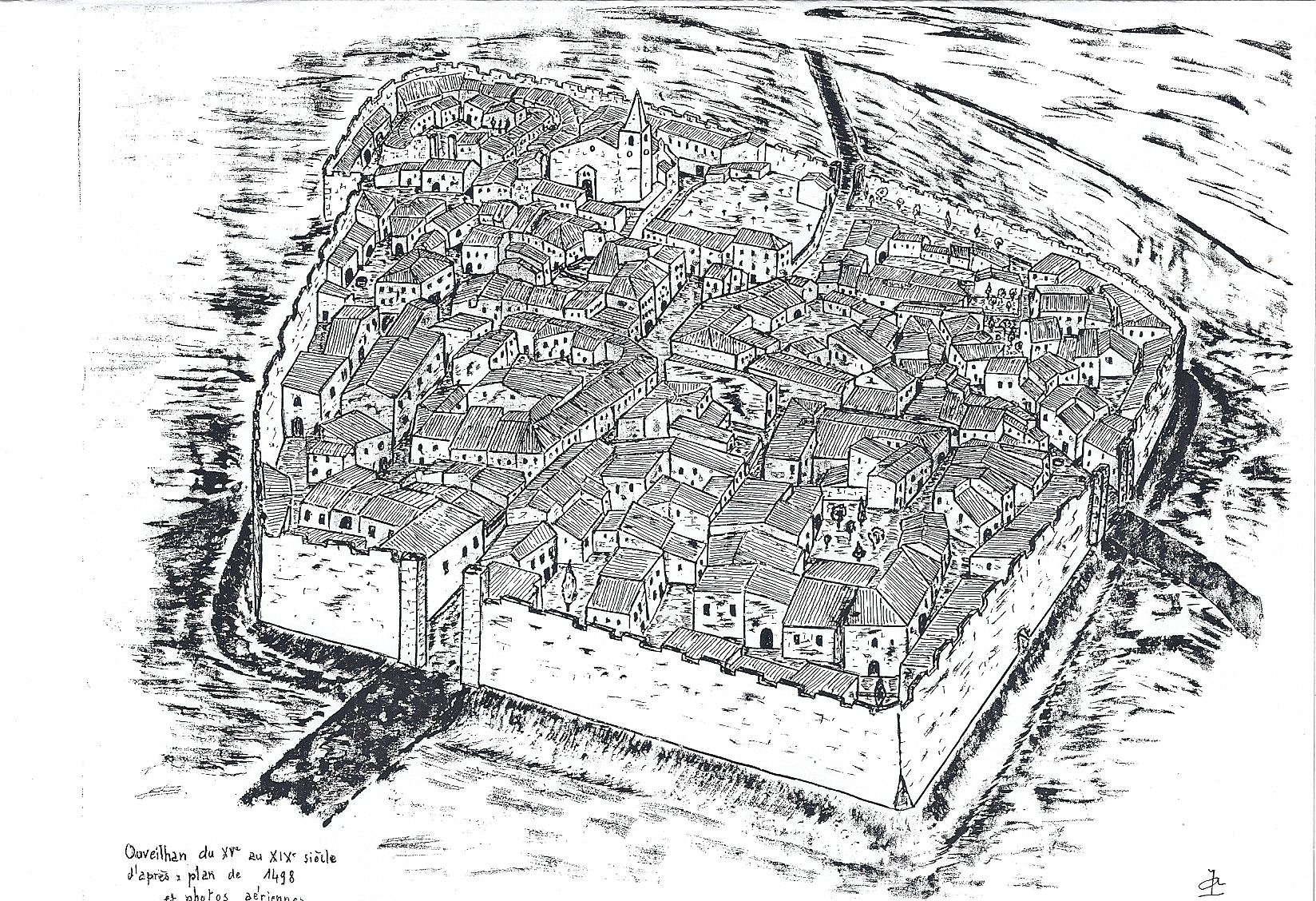 Schéma Ouveilhan an 1498